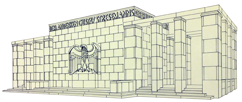 Mainz: Abbildung der ehemaligen Gedenkstätte für Gustav Stresemann (1878-1929), dem Pionier der Völkerverständigung, der europäischen Einigung und der Aussöhnung mit Frankreich. Hinweis: Diese Abbildung befindet sich an einer Gedenktafel am Fischtorplatz in Mainz. Es ist öffentlich zugänglich und unterlieg somit der Panoramafreiheit.